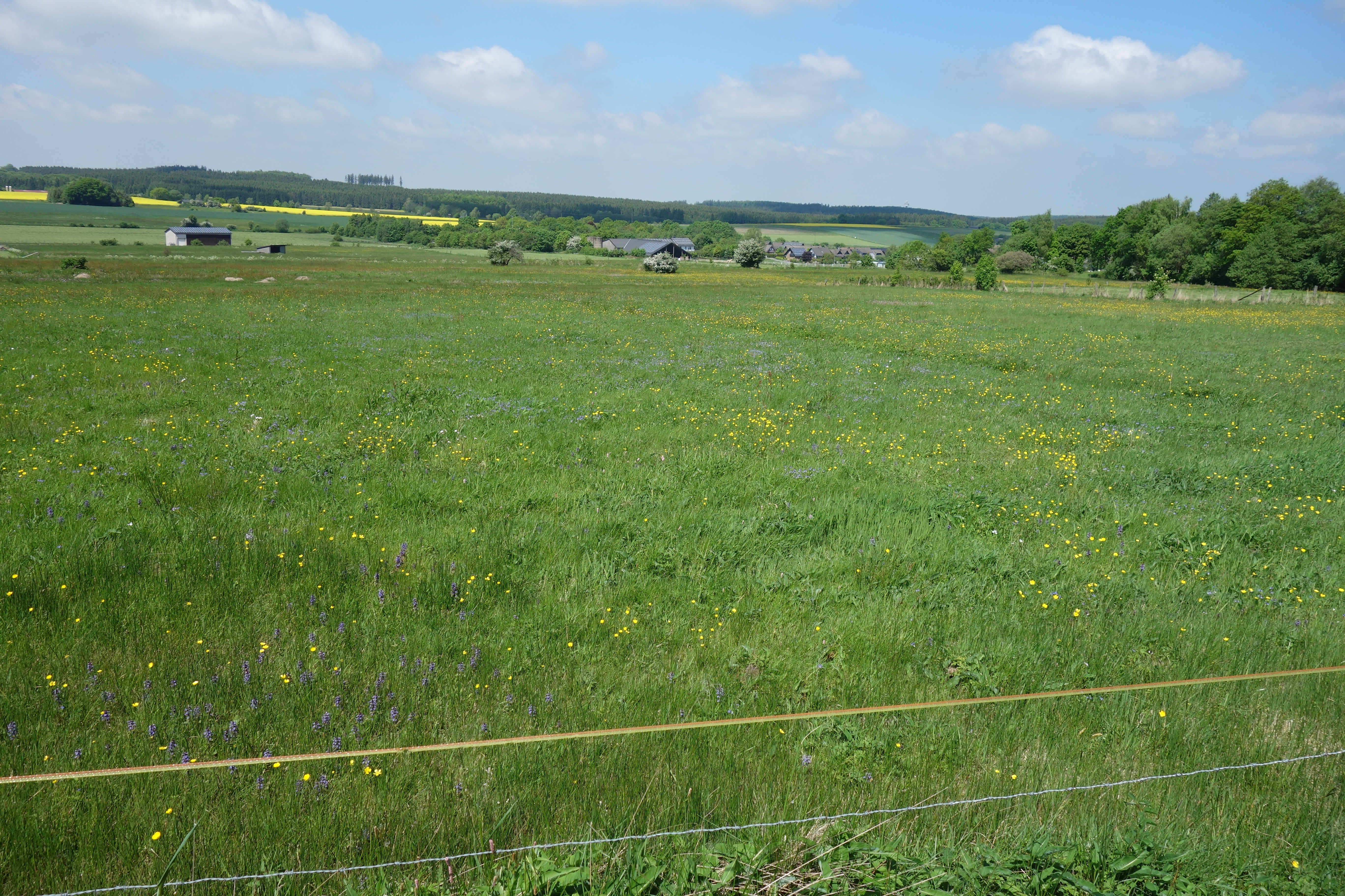 Naturschutzgebiet Brüche im Südosten. Im Bild ist vorne ein Feuchtweidenbereich zu sehen.